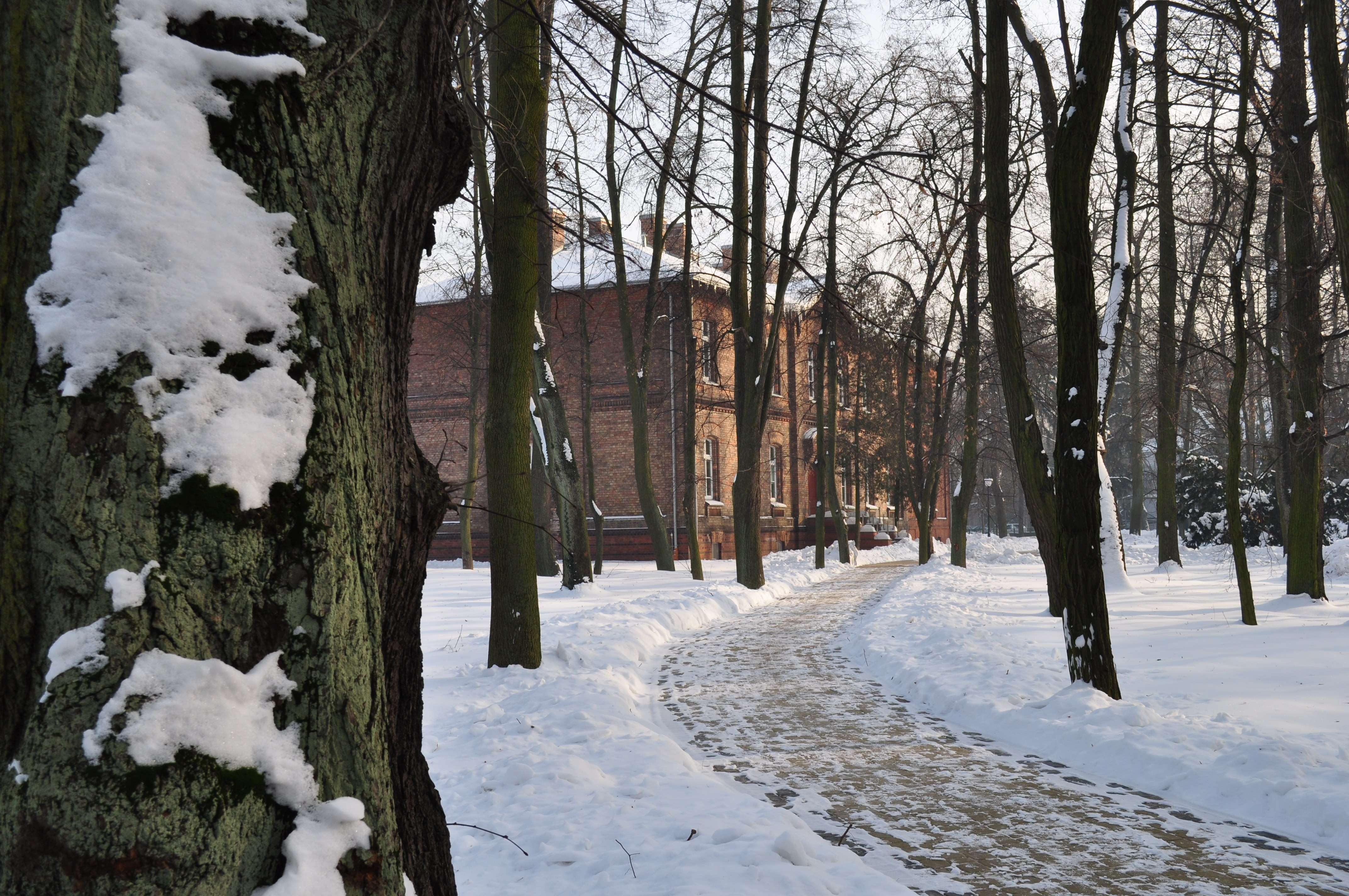 Oddział V Psychiatrii Konsultacyjnej (część Kliniki Psychiatrii WUM)